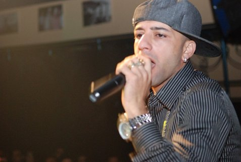 Alon De Loco